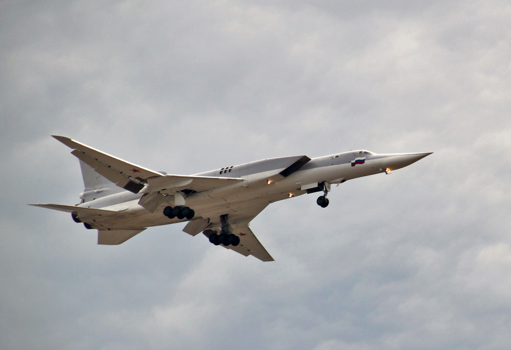 Ту-22М3 заходит на посадку на аэродром Дягилево